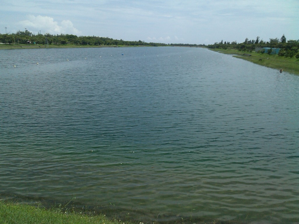 位於台東市郊區 台11線省道(中華大橋)旁的活水湖 外觀呈長方形